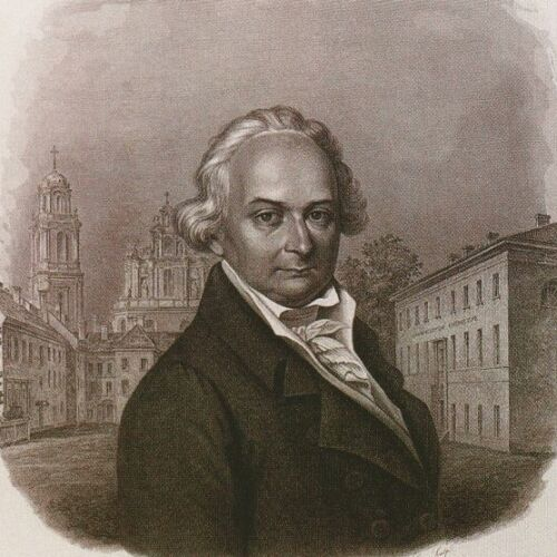 Andrzej Sniadecki (1768–1838)